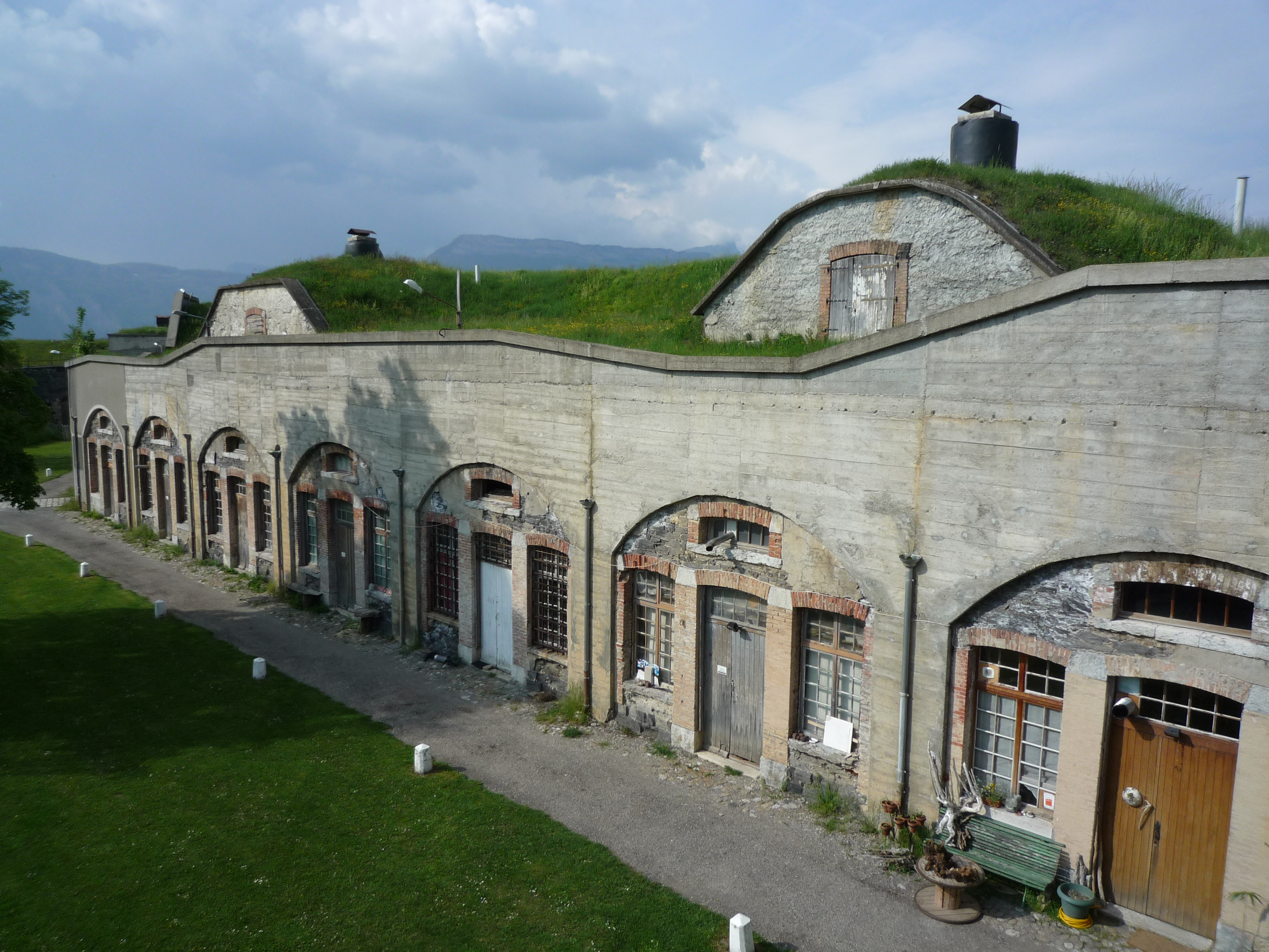 La cour intérieure du Fort du Mûrier vue d'en haut.